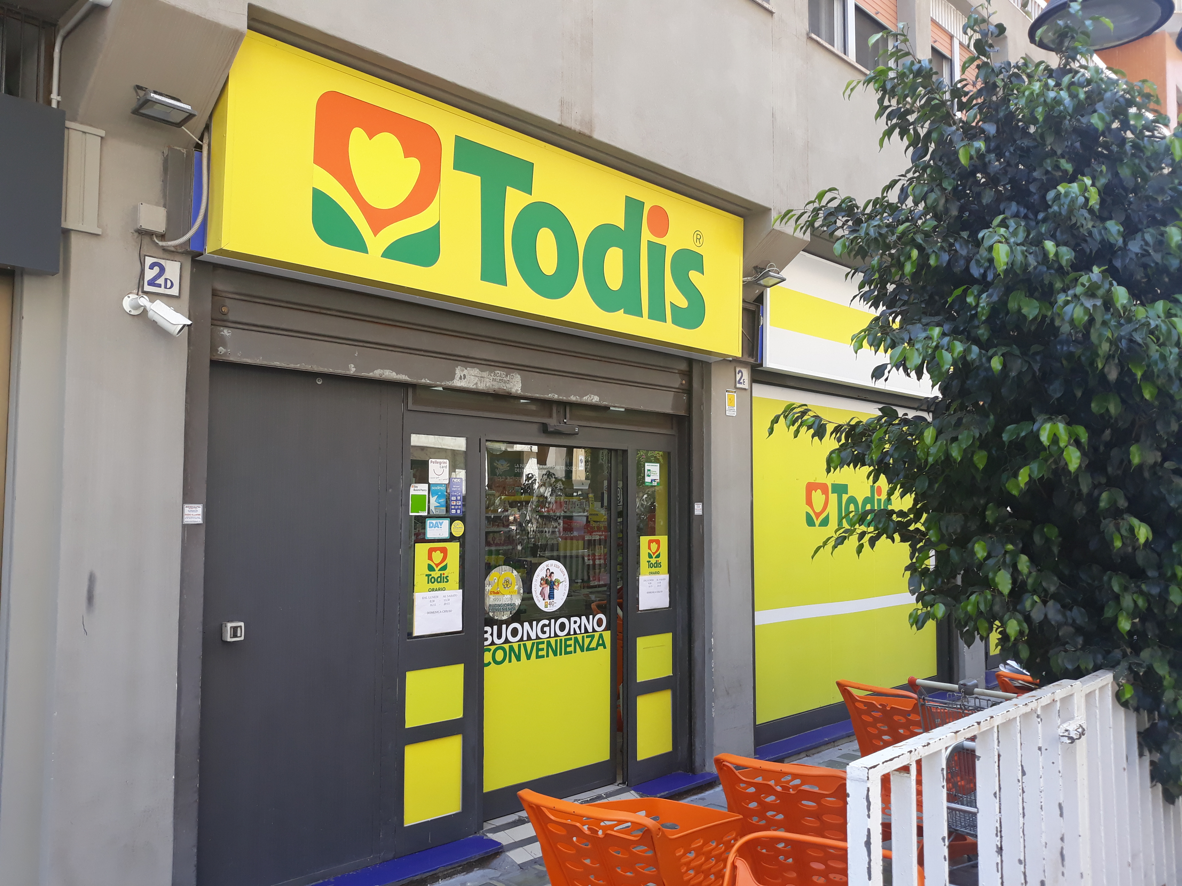 Supermercato Todis situato a Palermo